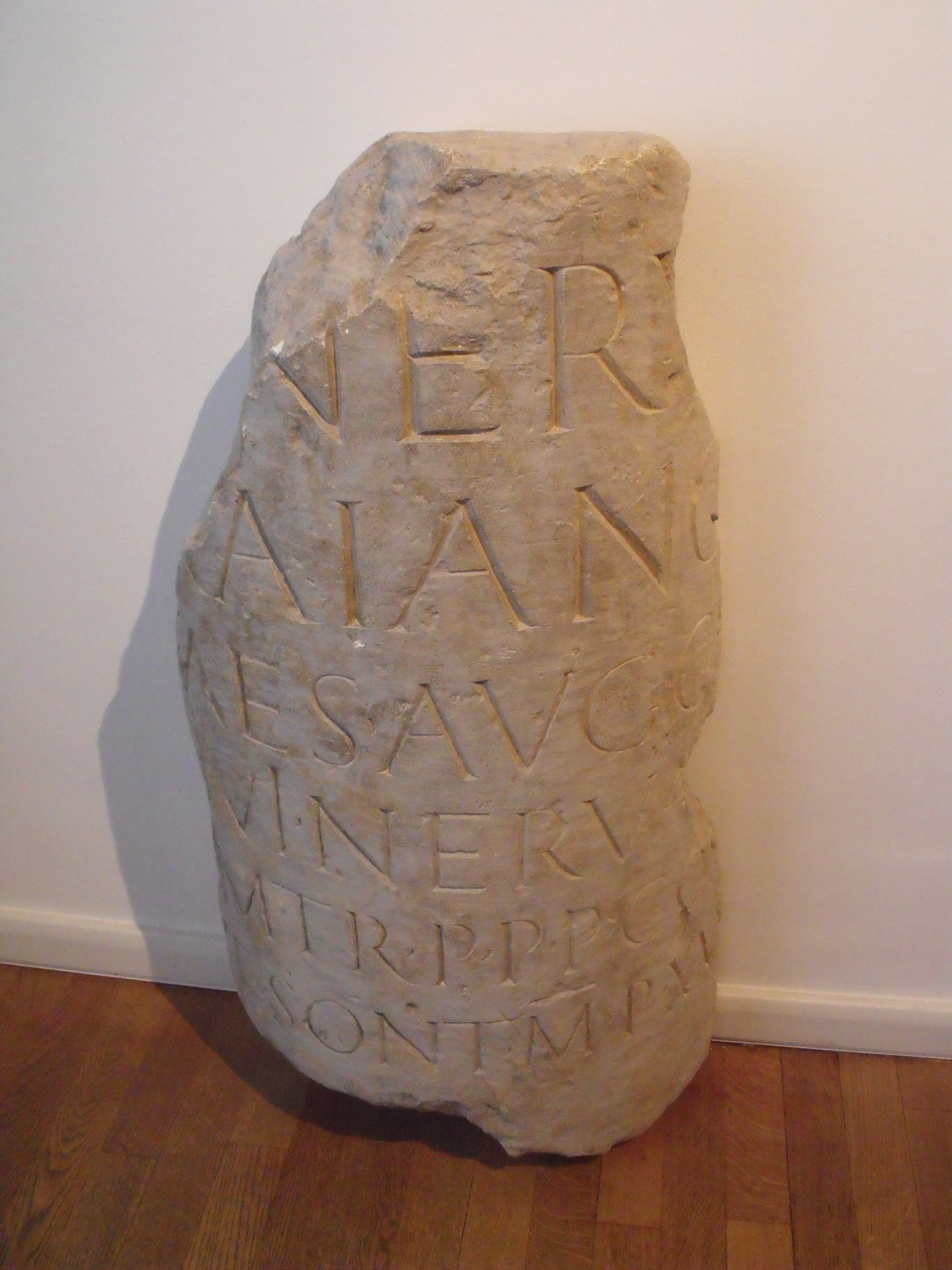 Borne romaine issus des fouilles de Mandeure-Mathay, Musée de Montbéliard